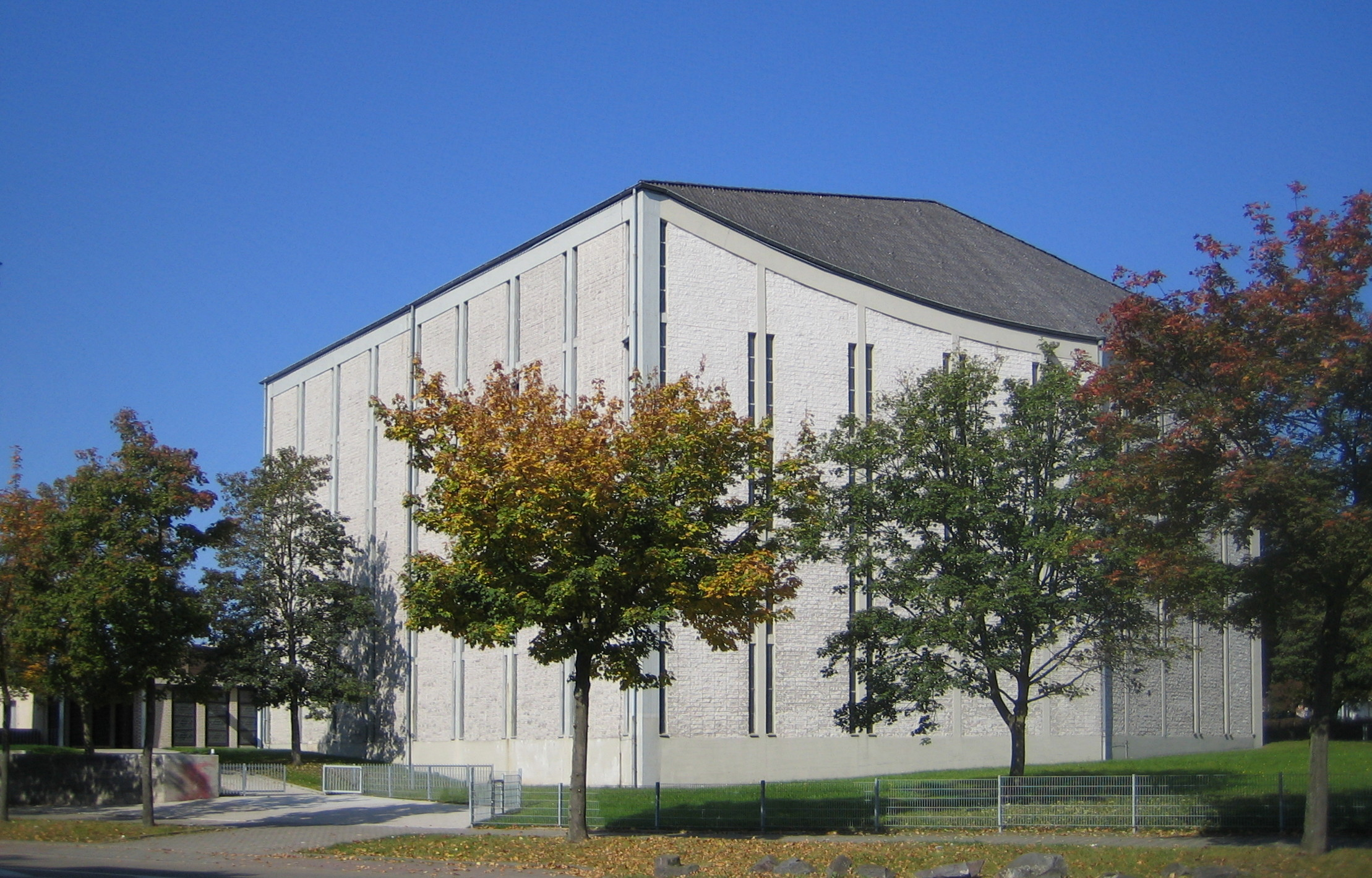 katholische Kirche St. Paulus in Saarbrücken-Rastpfuhl, Rheinstraße; erbaut 1961, um 1980 verändert